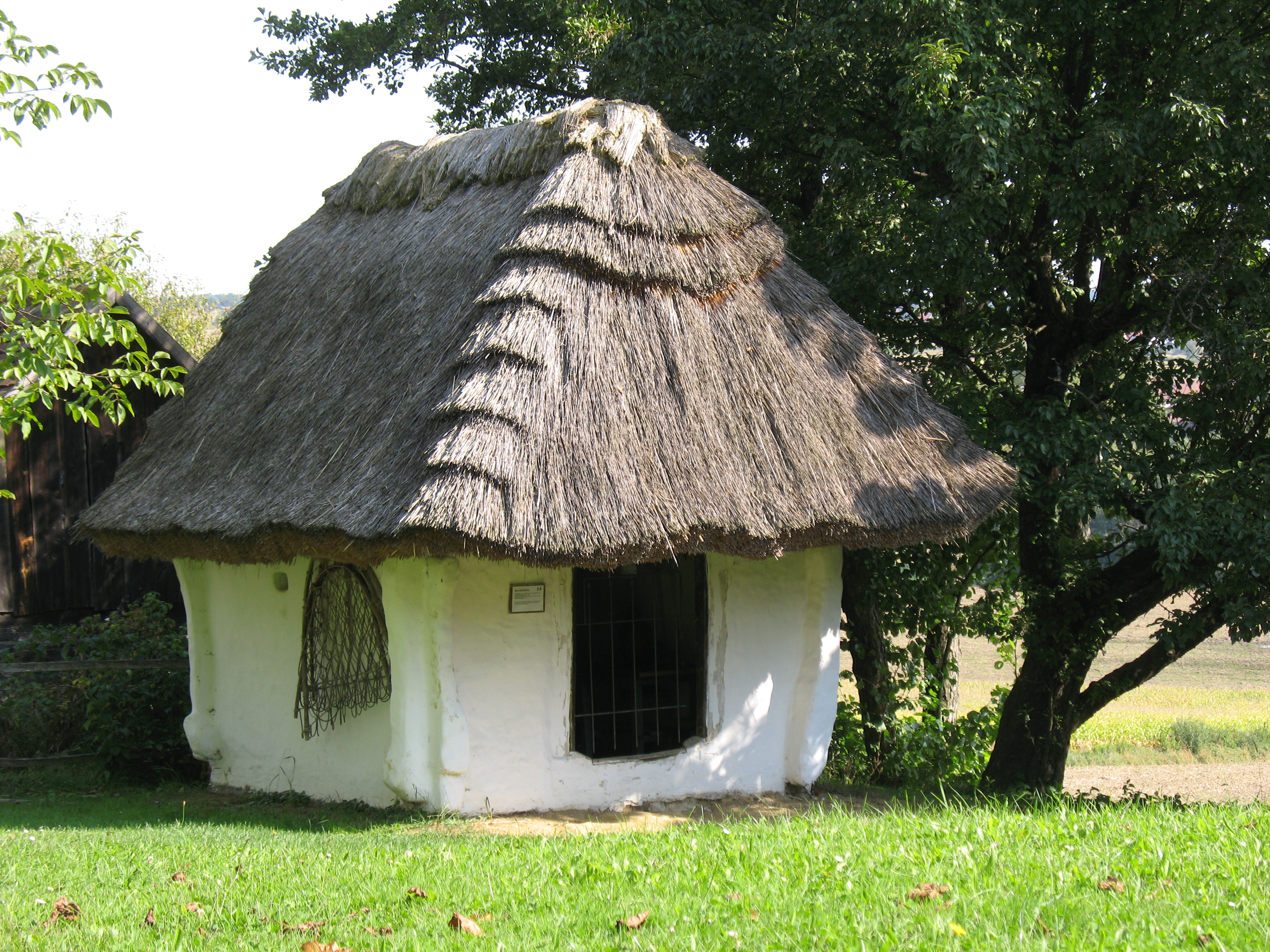 Kellerstöckl aus Postrum-Bergen